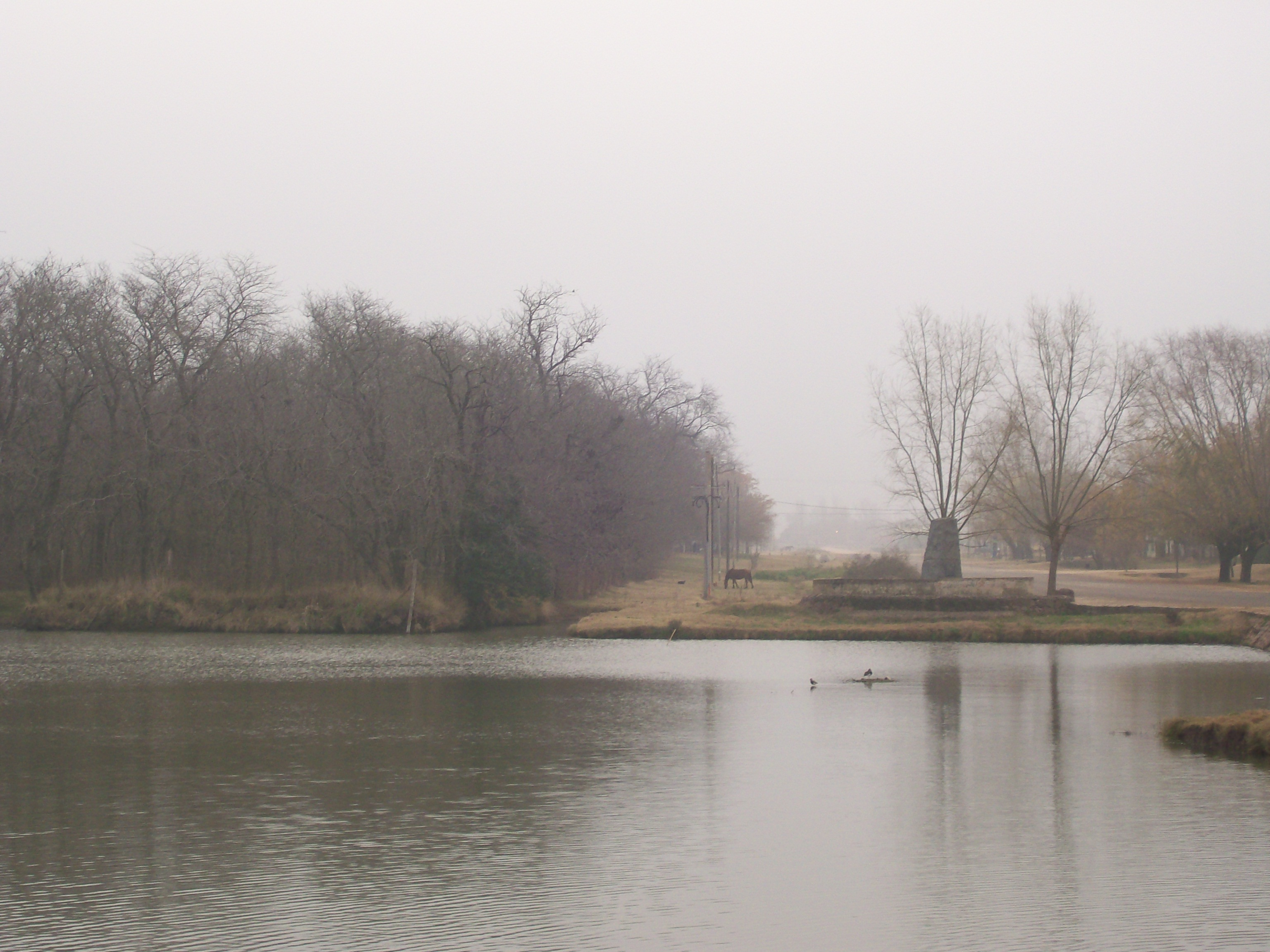 Río Areco en San Antonio de Areco, Provincia de Buenos Aires, Argentina.